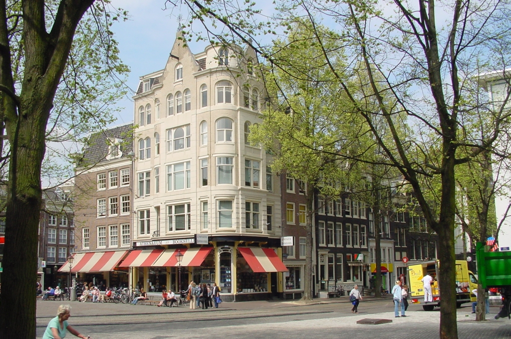 Het pand van Athenaeum Boekhandel aan het Spui